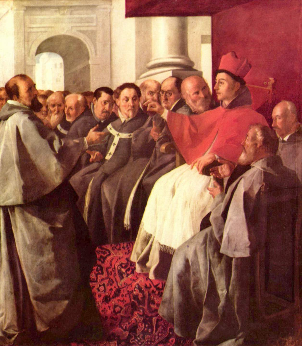 Saint Bonaventure au concile de Lyon, 1629